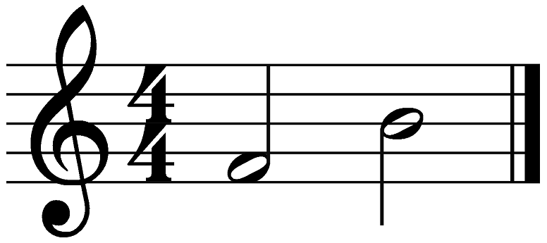 Тритонус